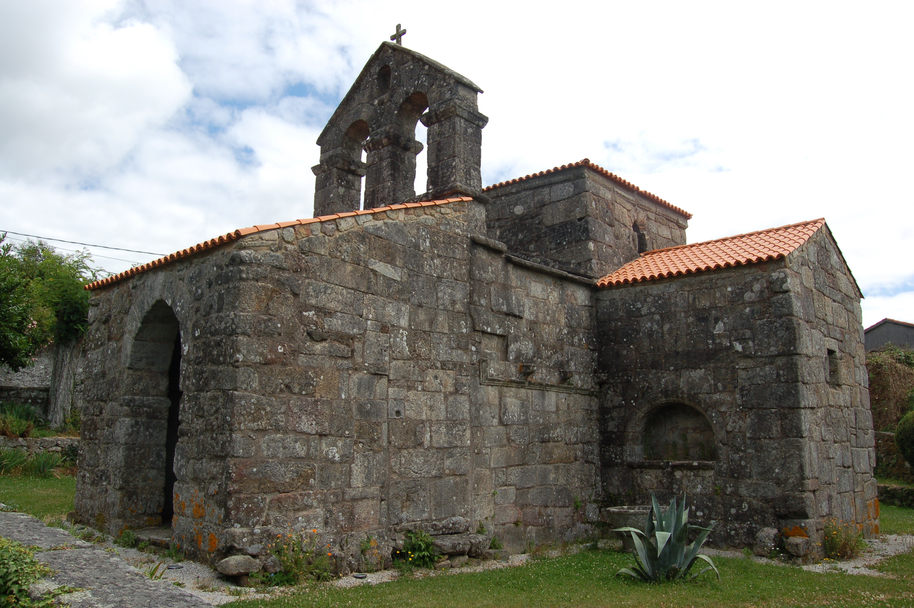 Igrexa de Santa Comba de Bande